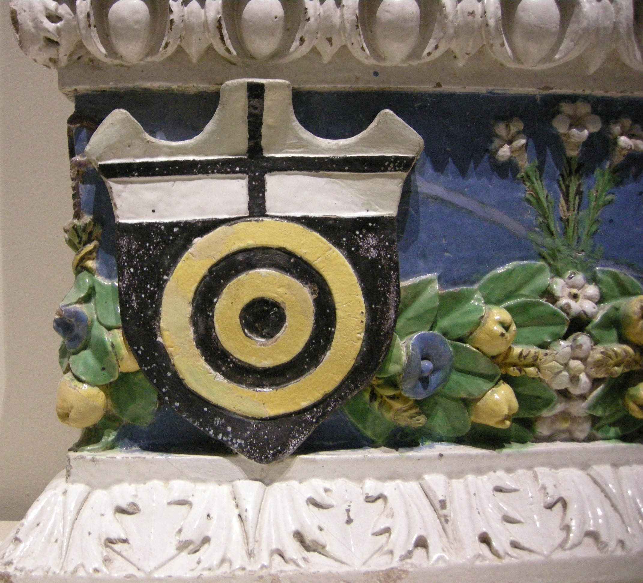 Andrea della Robbia, Adorazione dei magi, 1500-10, stemma Albizi.